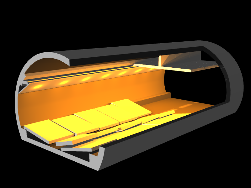 笹子トンネルの天井板崩落事故の様子を簡潔に再現した3Dモデル